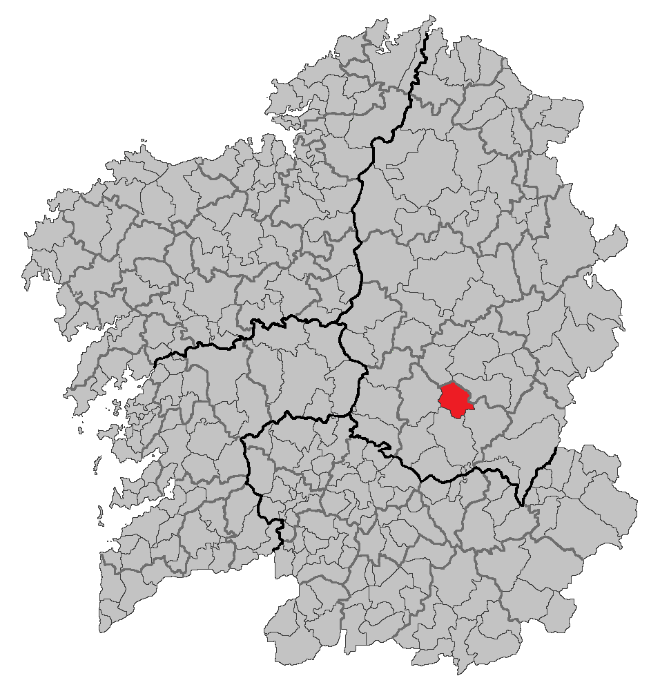 Mapa coa localización do concello de Bóveda.